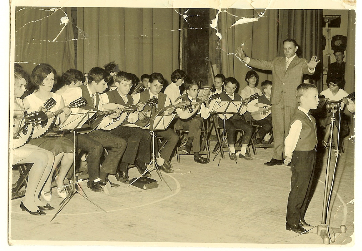 L'Estudiantina bayonnaise au théâtre de Bayonne dans les années 1960. Elle tire son nom d'Estudiantina de la tradition étudiante des Estudiantinas ou Tunas.